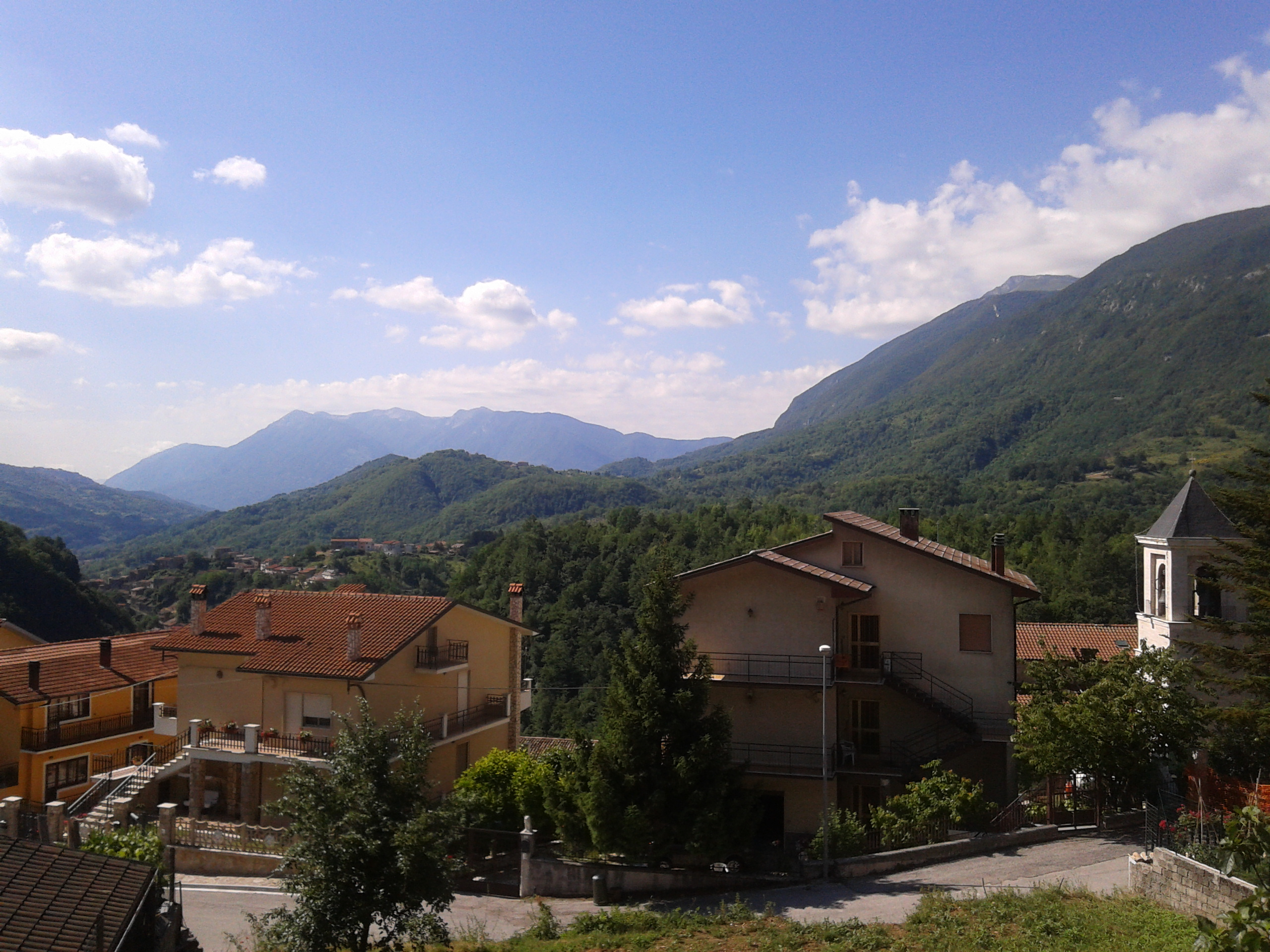 Foto panoramica dal borgo antico di Capistrello